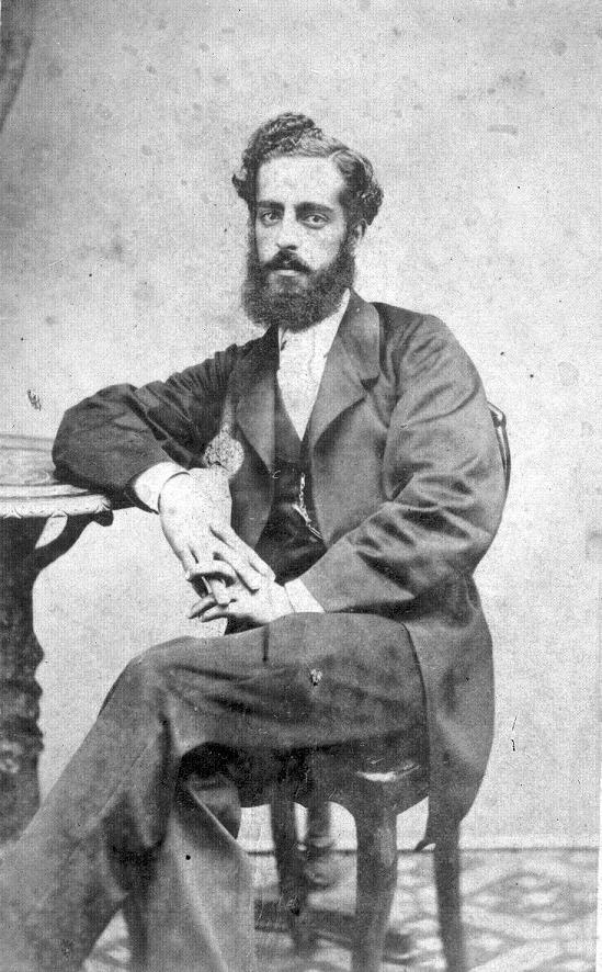 Fotografía de José Pedro Varela (1845 - 1879), sociólogo, periodista y político uruguayo.